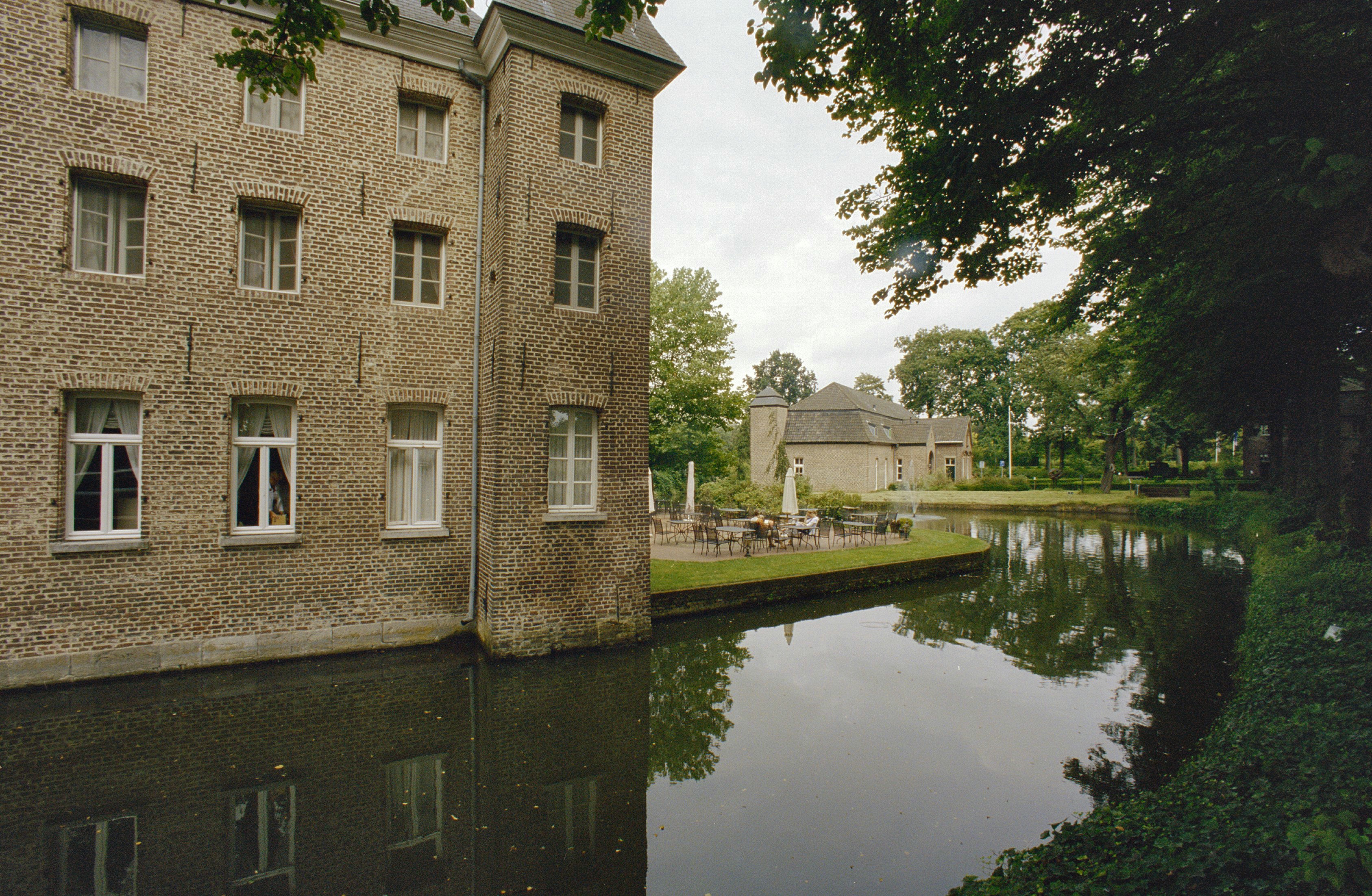 Kasteel Holtmuhle: Zicht op de voormalige tiendschuur op de nederhof, gedeelte van het omgrachte kasteel met hoektoren op de voorgrond (opmerking: Gefotografeerd voor Kastelen in Limburg (1000-1800), Burchten en landhuizen)